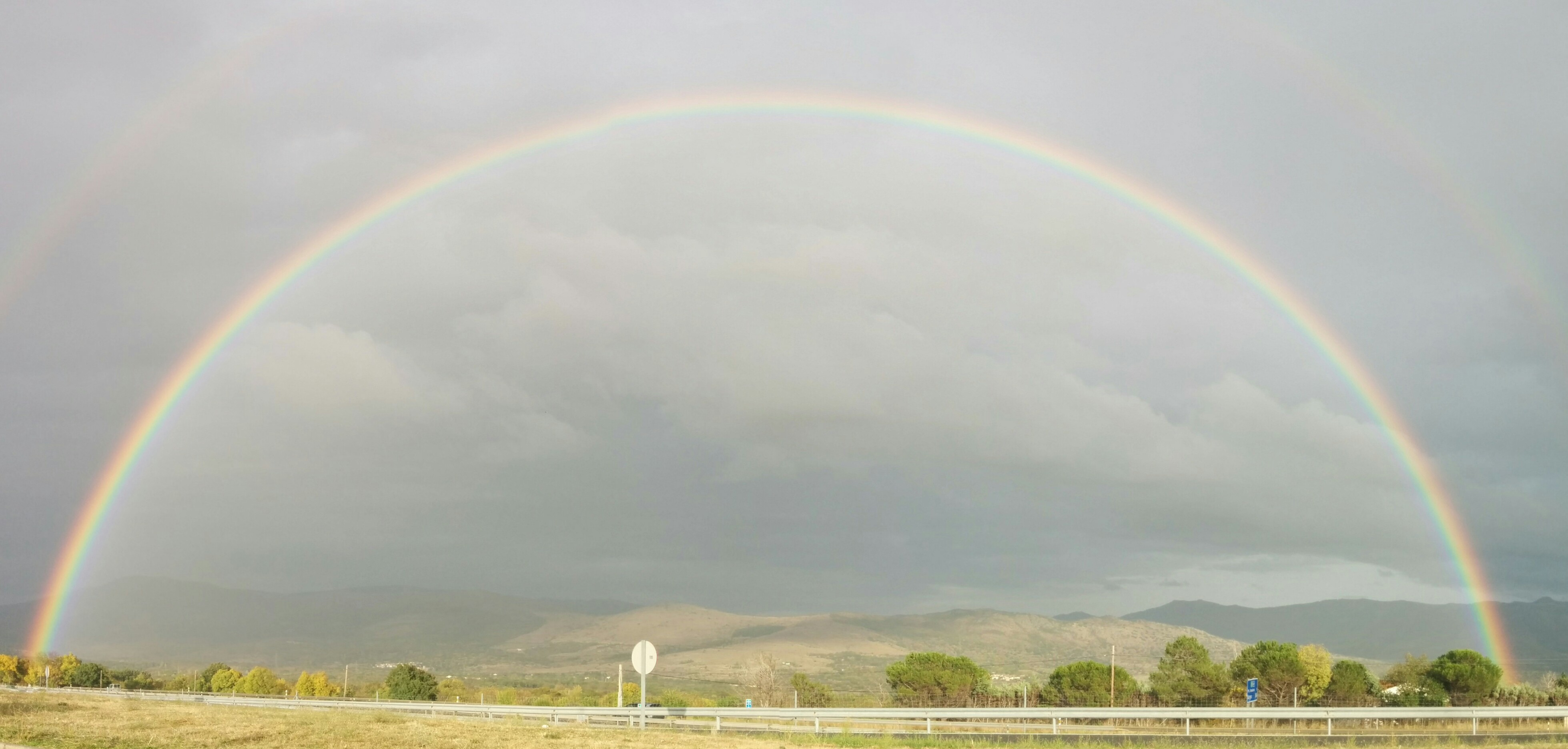 Arcoiris sobre la A-1 (Comunidad de Madrid, España).